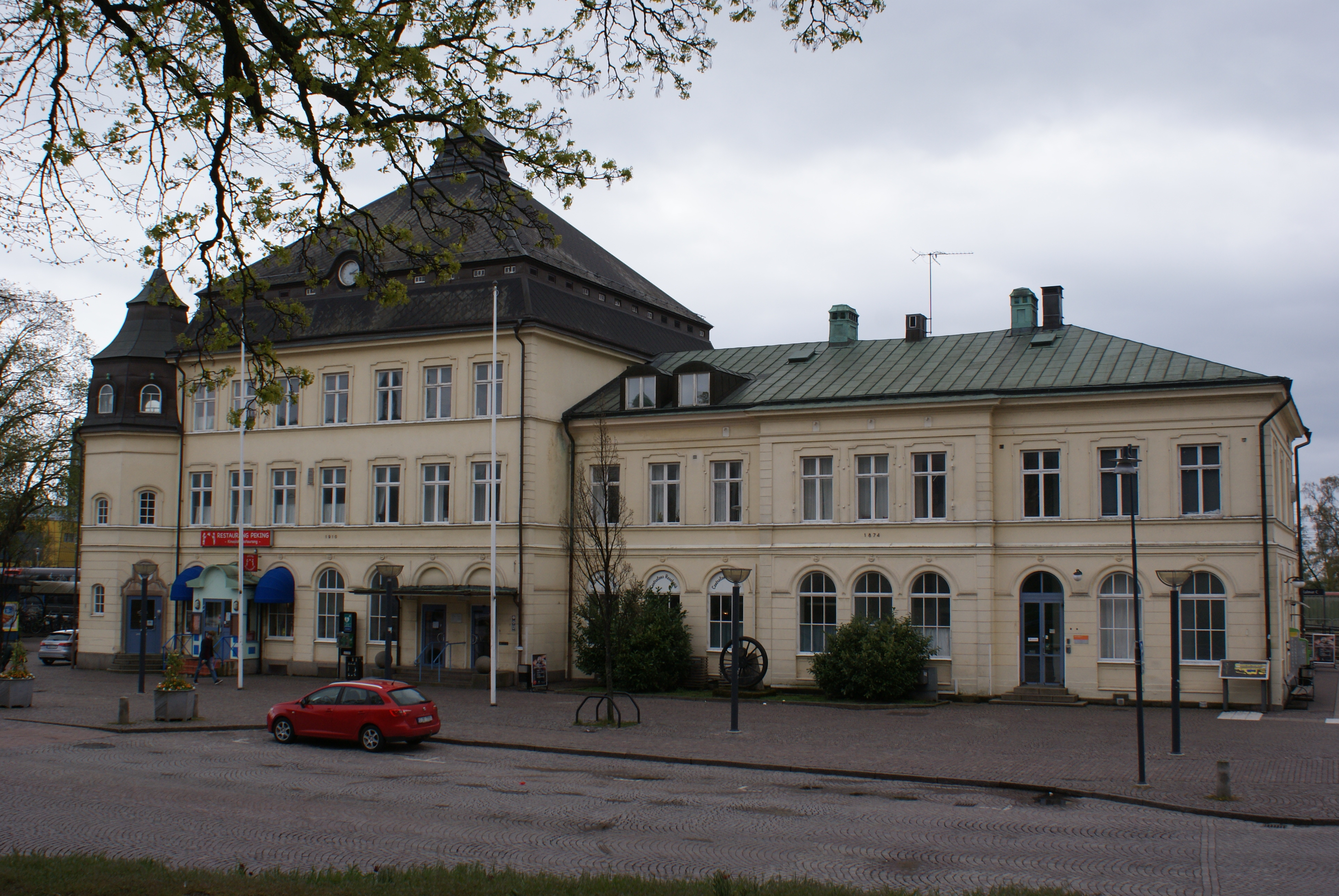 Stationshuset framsida